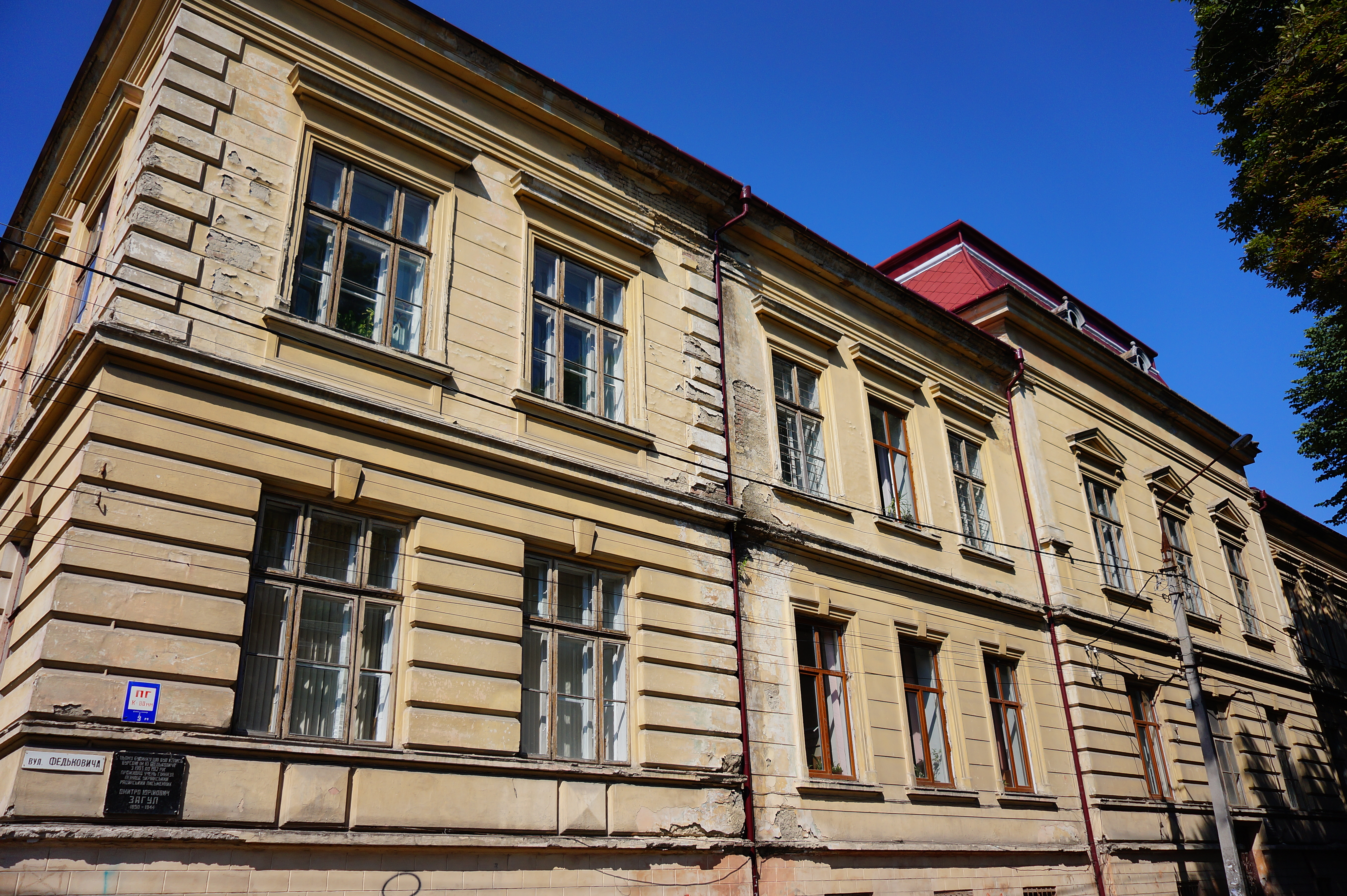 Будинок\колишня бурса\,в якому проживав Загул Д.Ю.-український поет., Чернівці, вул.Федьковича,16